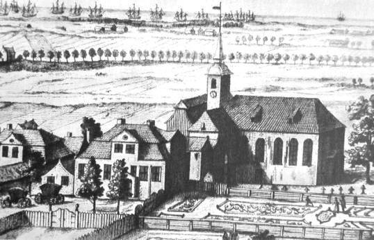 Gdańsk. Wielka Aleja, nieistniejący kościół i szpital św. Aniołów.